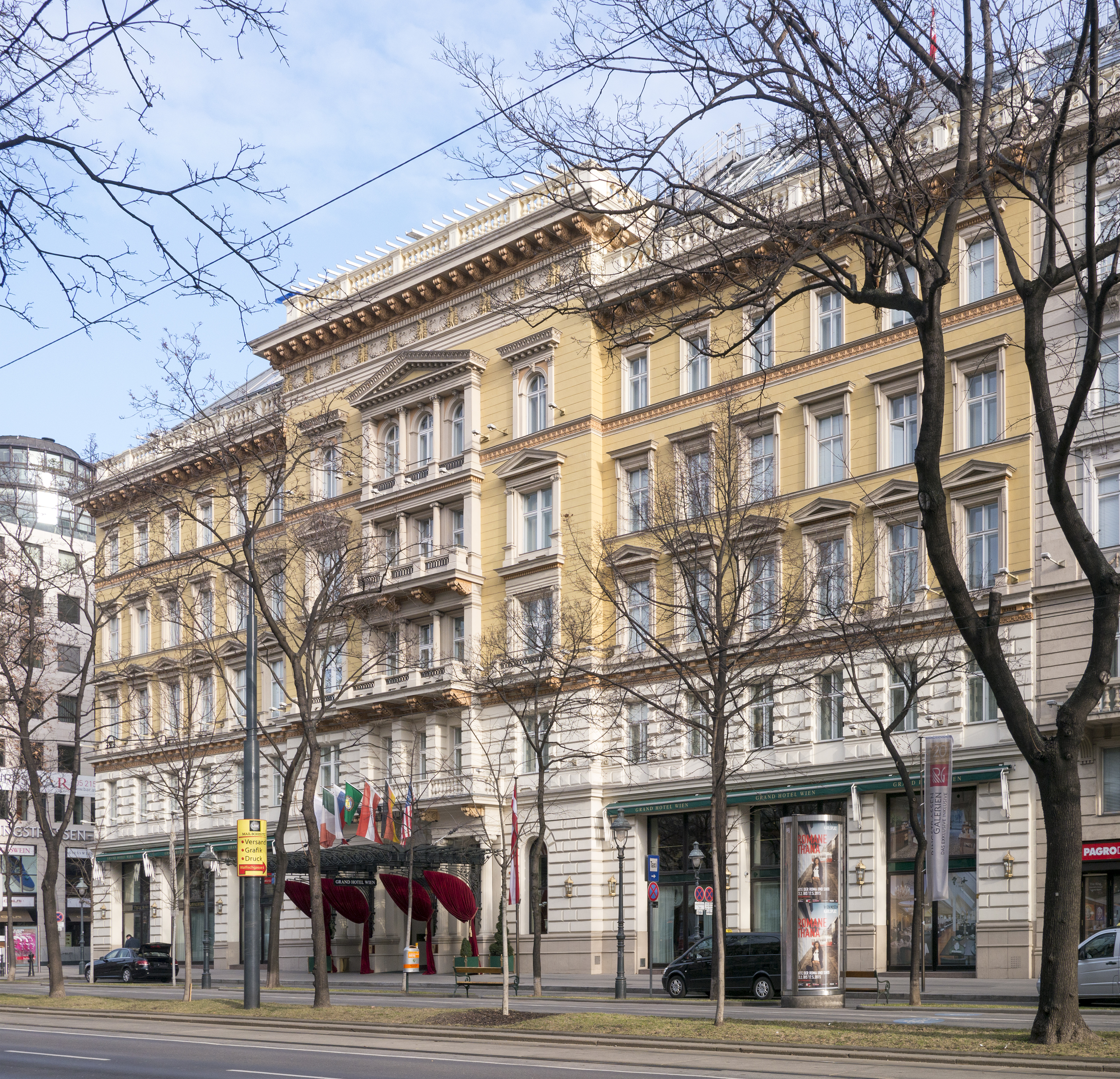 Grand Hotel und Ringstraßengalerie, Dänische Botschaft